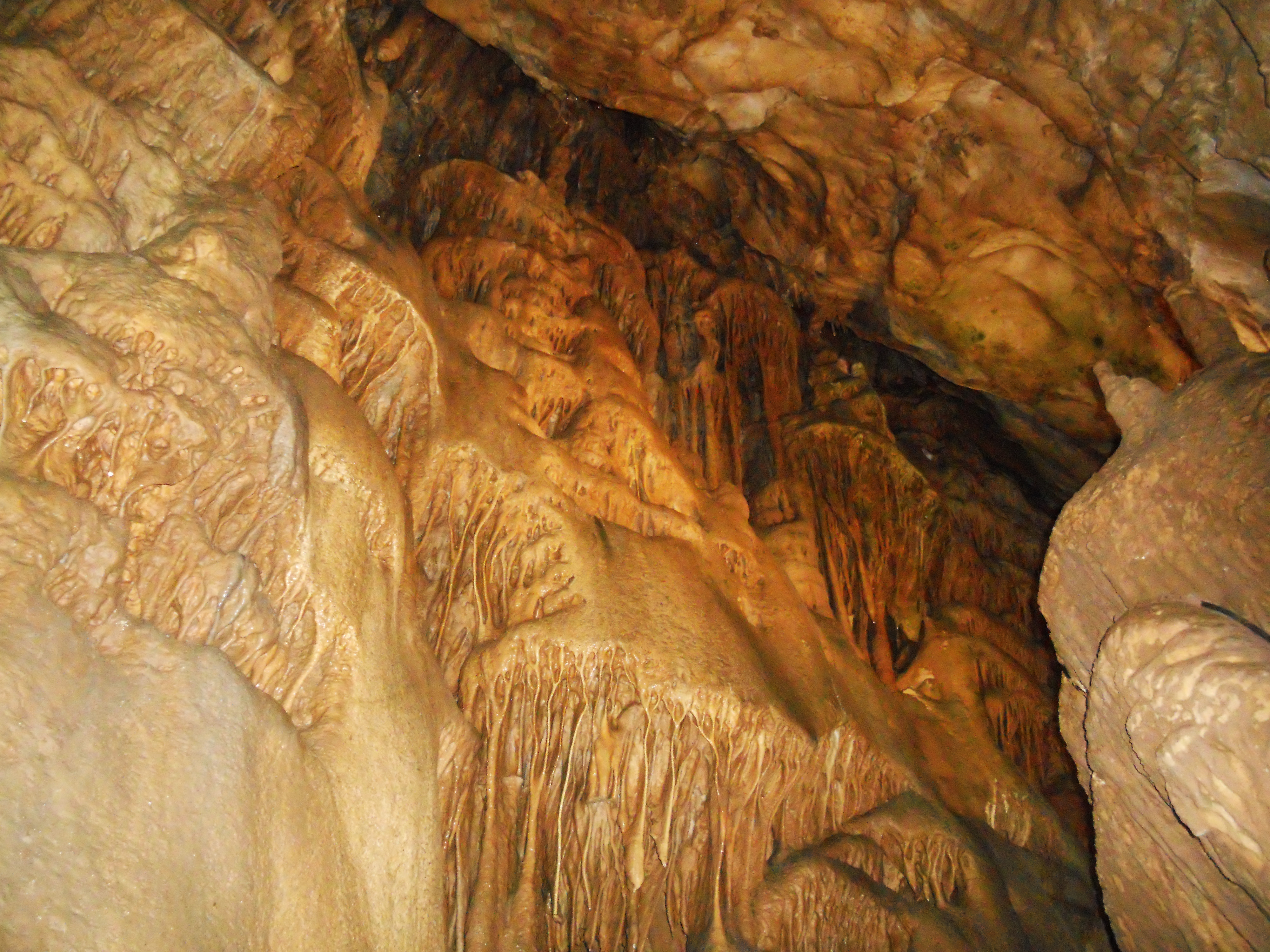 Ово је фотографија заштићеног природног добра у Србији под шифром: СП164 This is a a photo of a natural area in Serbia with ID: СП164 Resavska (Divljakovačka) pećina je pećina u istočnoj Srbiji, na 20 kilometara od Despotovca. Spada među najveće i najlepše pećine u Srbiji. Duga je 4,5 km.